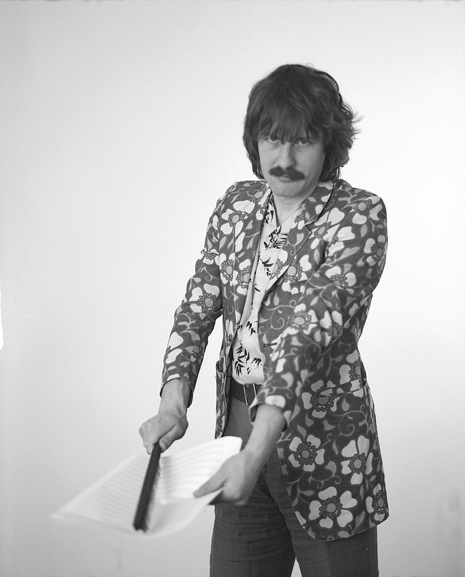 Das Dokument zeigt eine von vier Aufnahmen von Steff Signer, die 1982 zuhanden der Promotion von Infra Steff's Red Devil Band im Fotostudio entstanden sind. Signer trägt den Blumenkittel von 1968, ein gelbes Hemd mit Chinamuster und eine grüne Military Hose. In der Hand hält er einen von Patrick Signer angefertigen "Multi-Stimmen-Schreiber" für Partituren.